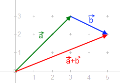 Matematik A/Vektorer i planen: Grafisk fortolkning af addition af to vektorer i planen.